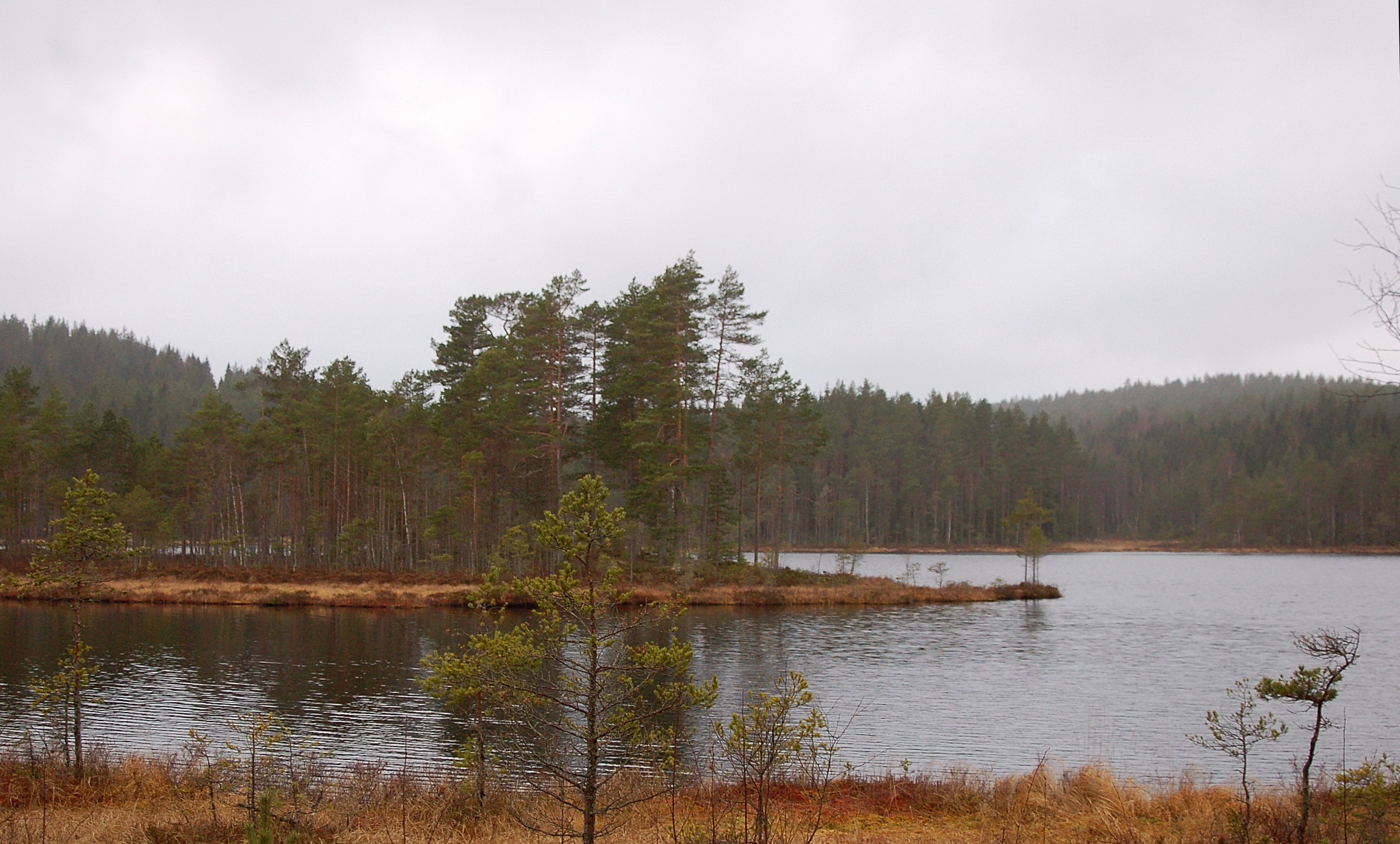 Glassnästjärnet är en liten tjärn i Glaskogens aturreservat.